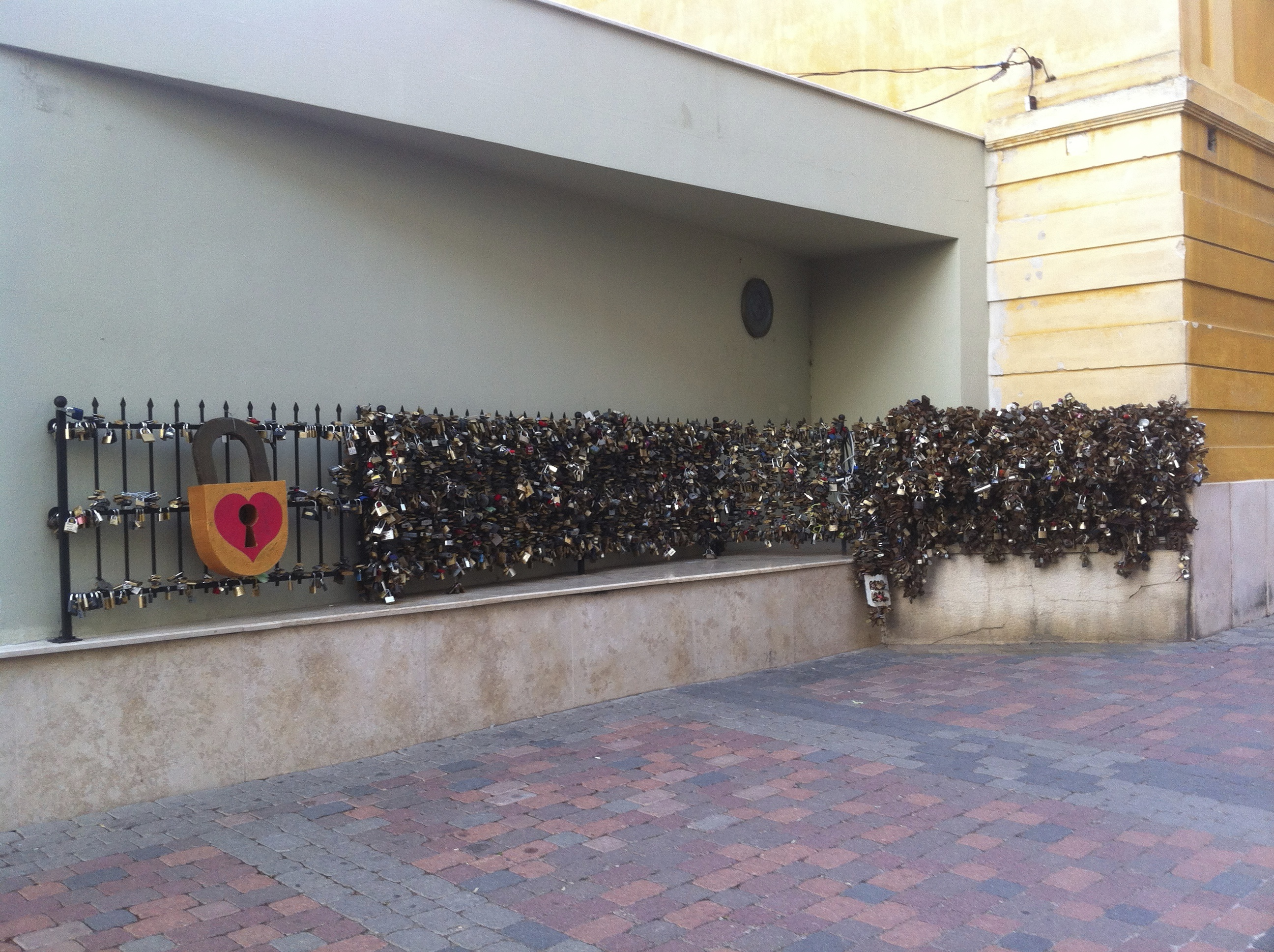 Az eredeti, 2010-ben felújított pécsi lakatfal